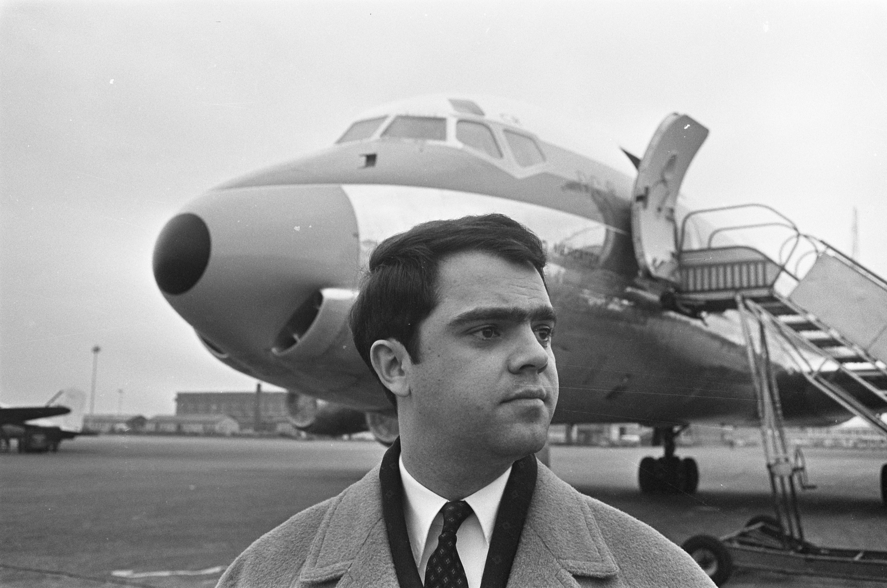 Collectie / Archief : Fotocollectie Anefo Reportage / Serie : [ onbekend ] Beschrijving : Aankomst Duitse jazz-pianist Eugen Cicero op Schiphol Datum : 16 februari 1967 Locatie : Noord-Holland, Schiphol Trefwoorden : jazz, muziek, pianisten Persoonsnaam : Cicero Eugen Fotograaf : Koch, Eric / Anefo Auteursrechthebbende : Nationaal Archief Materiaalsoort : Negatief (zwart/wit) Nummer archiefinventaris : bekijk toegang 2.24.01.05 Bestanddeelnummer : 920-0827